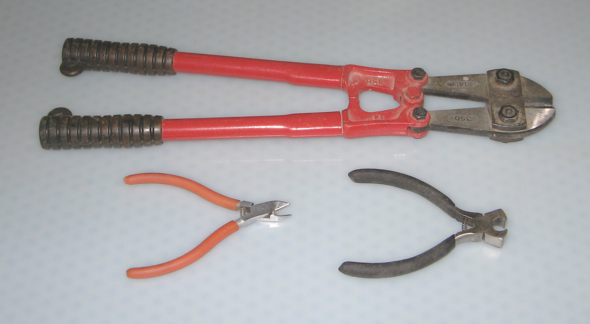 Mordiloj kun izoltaj fustoj: supre - kun dusxtupaj bastuloj por mordi dikan draton; sube maldekstre - kun flanka lokigxo de la mordantaj trancxiloj; sube dekstre - kun perpendikulara lokigxo de la mordantaj trancxiloj La foto estis farita de mi mem.